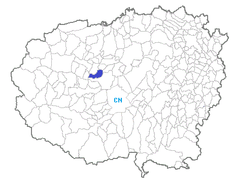 Posizione del comune nella provincia di Cuneo